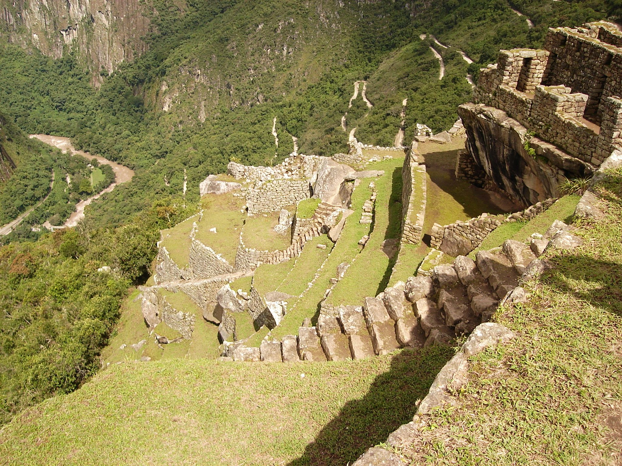 Foto tirada por mim, em Machu Picchu.